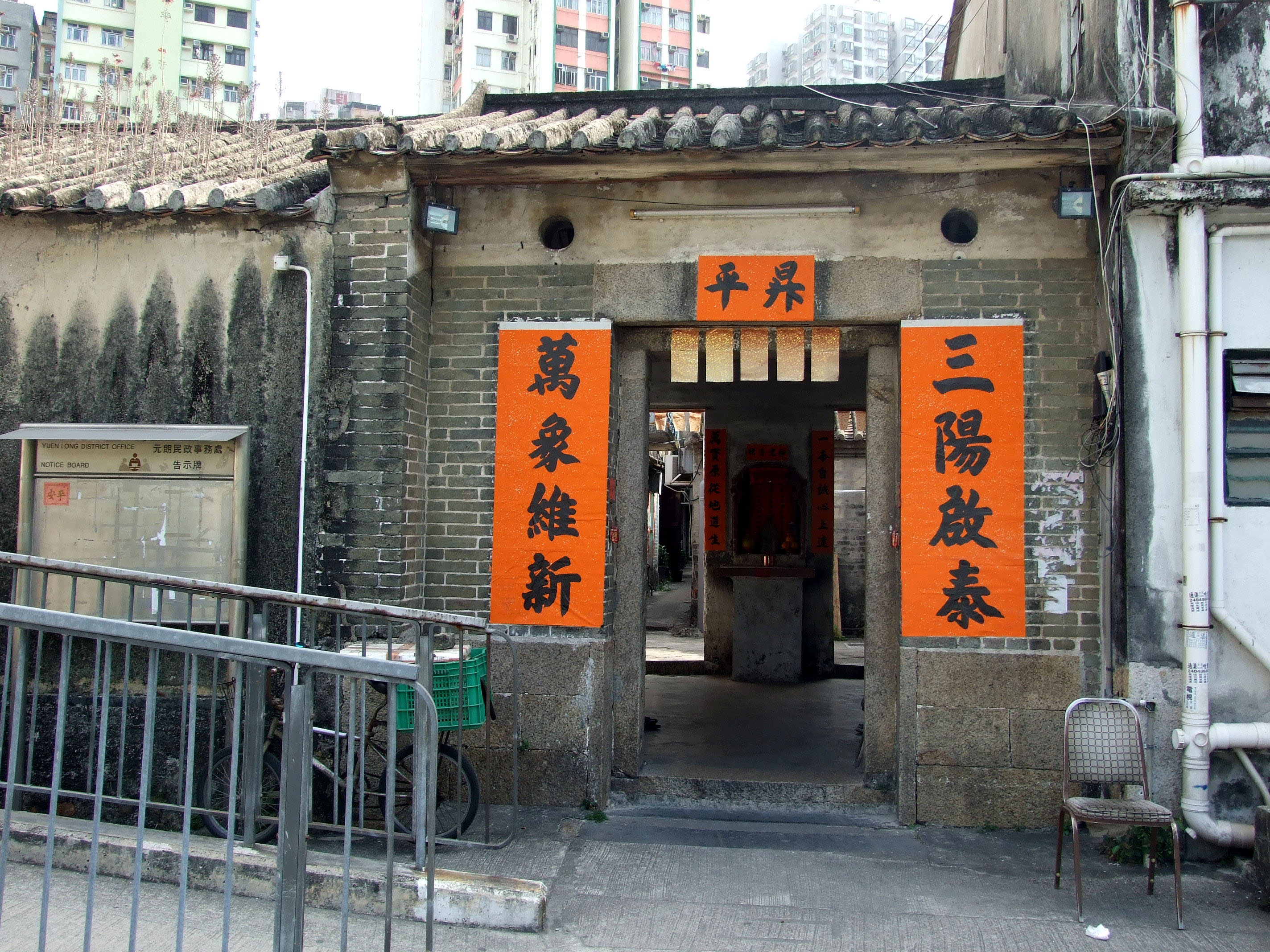 中文（香港）: 大橋村門樓